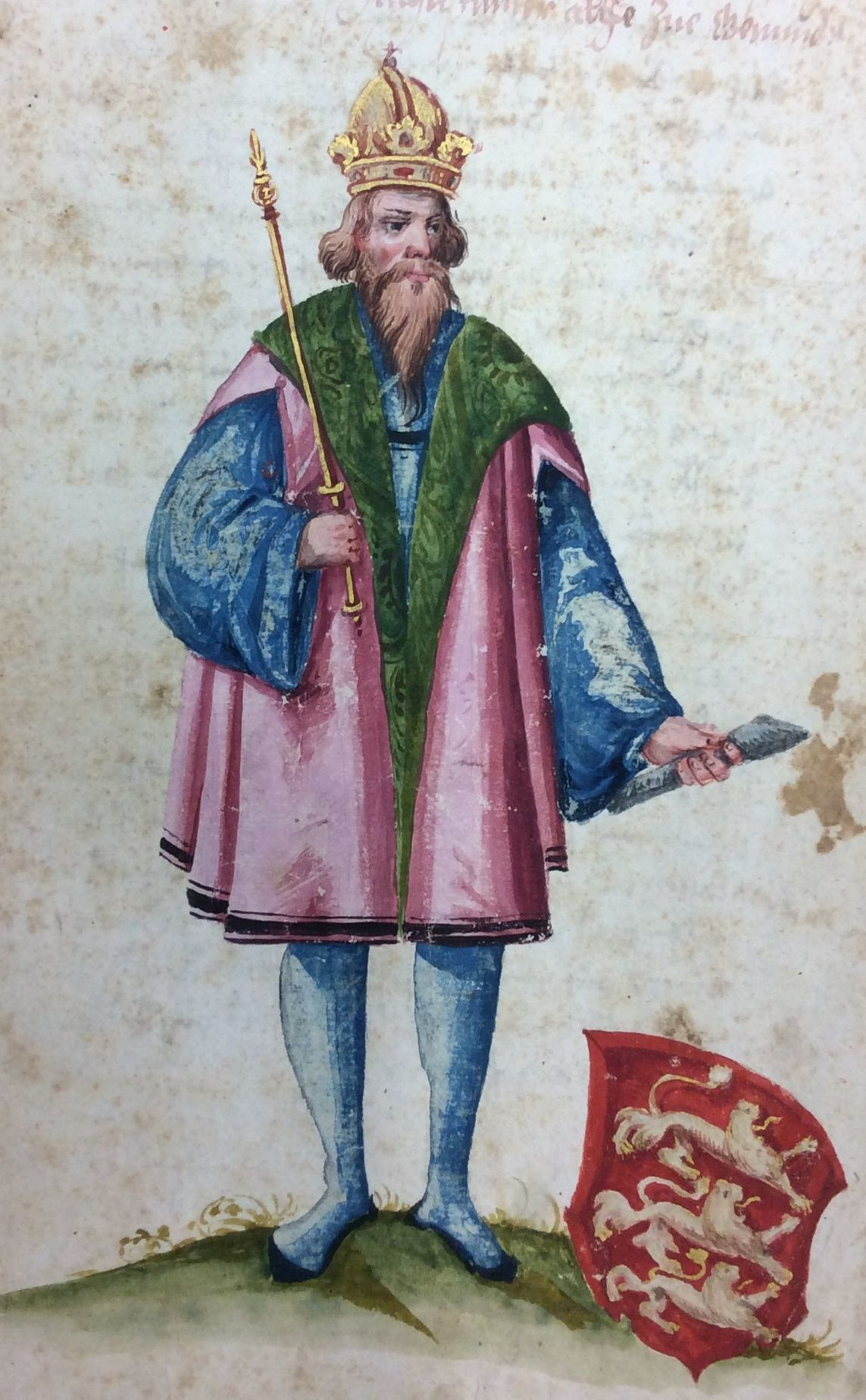 Stadtarchiv Schwäbisch Gmünd C 1 Nr. 4: König Konrad III. im Chronikensammelbands "Drei Gmünder Chroniken"